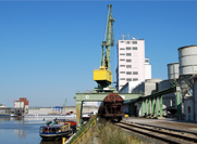 Infrastruktur bayernhafen Bamberg